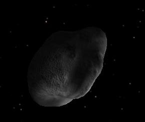 Jarnsaxa satélite de Saturno, creado con Celestia